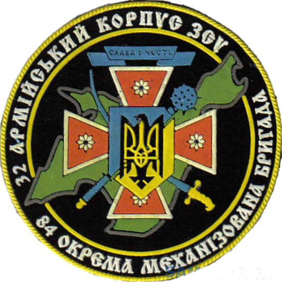 Нарукавний знак, 84-та окрема механізована бригада